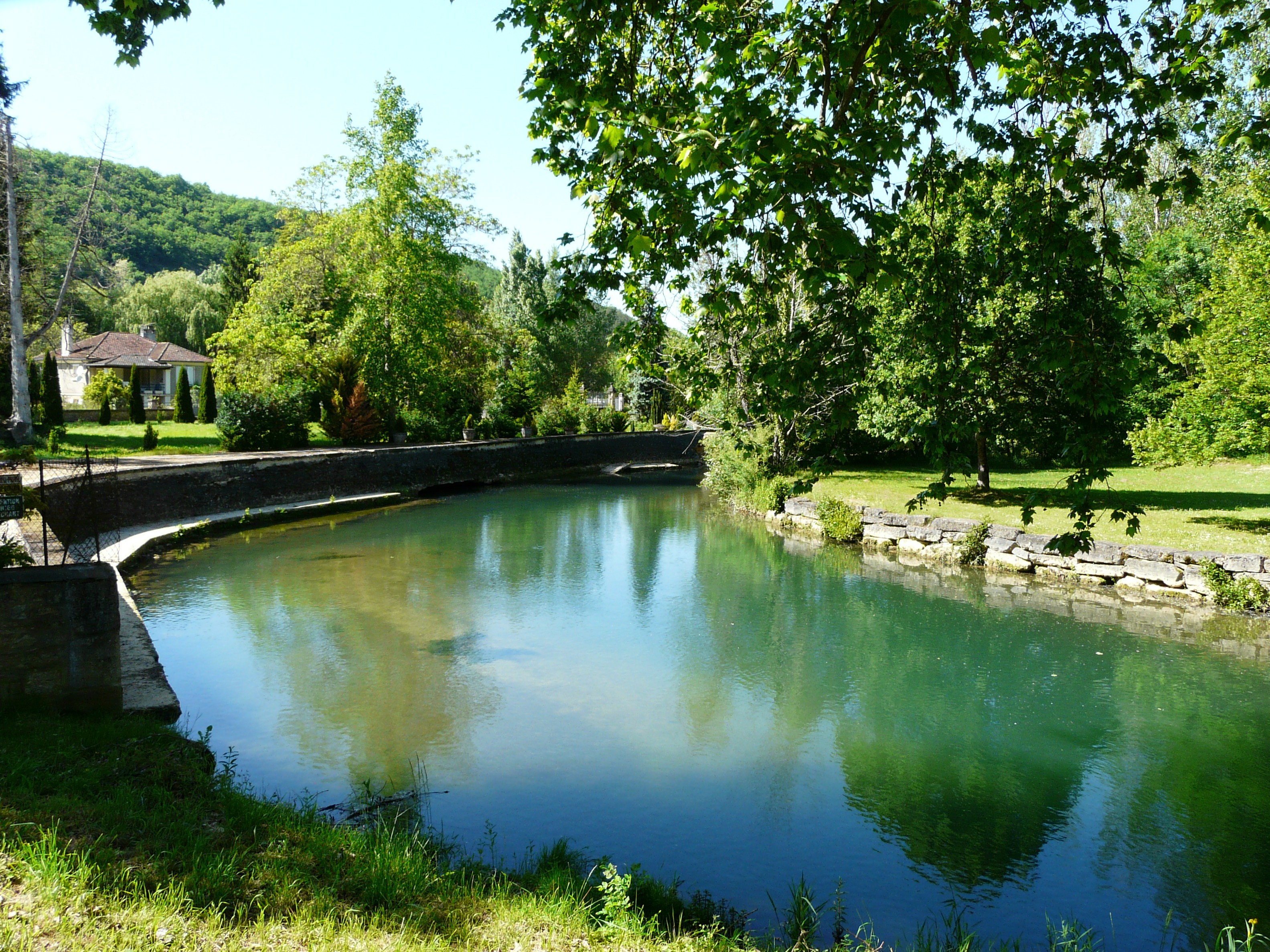 Le Céou en aval de la passerelle, Daglan, Dordogne, France.